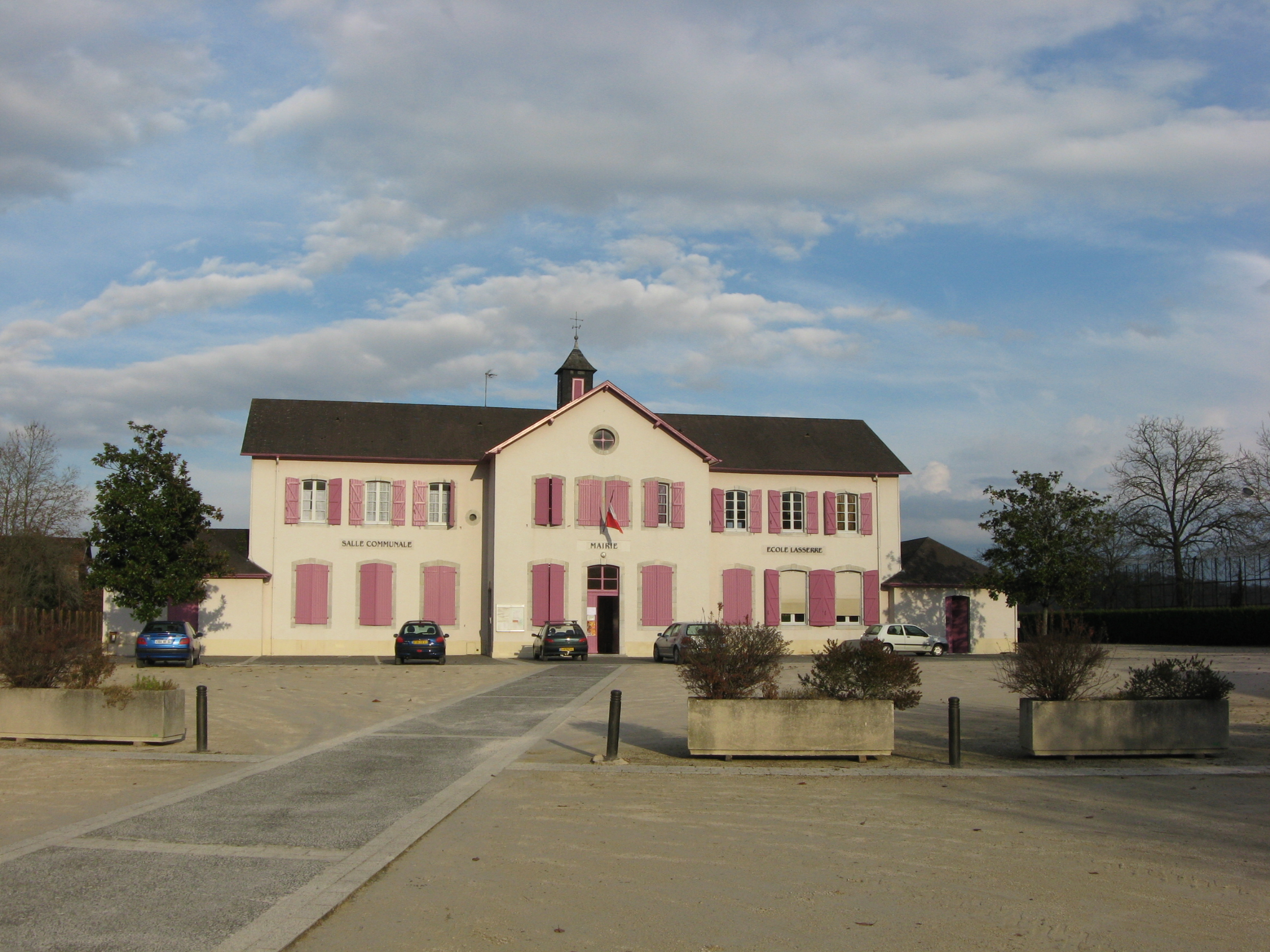 Mairie de Géronce (Pyrénées-Atlantiques) (Pyrénées).